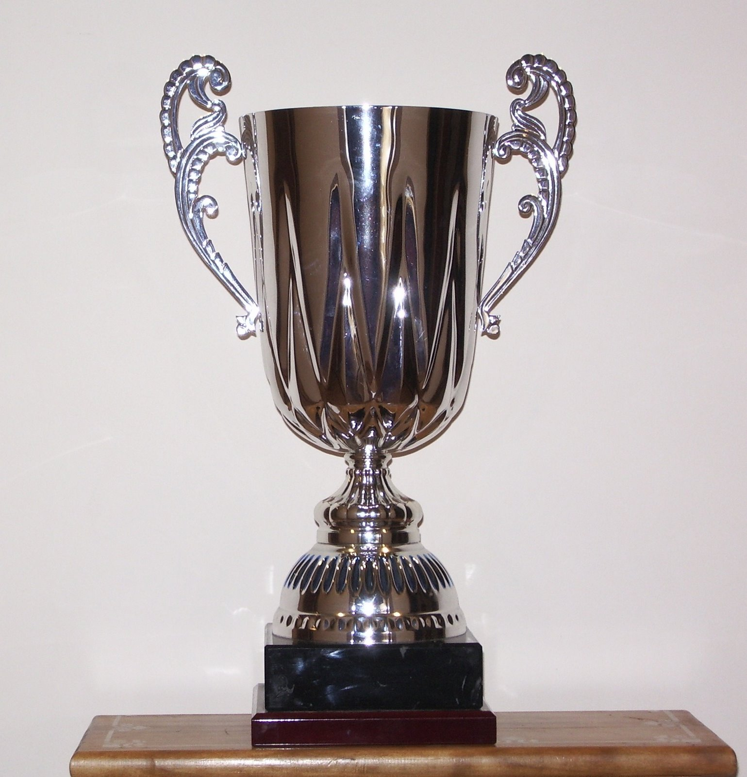 Troféu de la Copa Cantábrica de Liriu